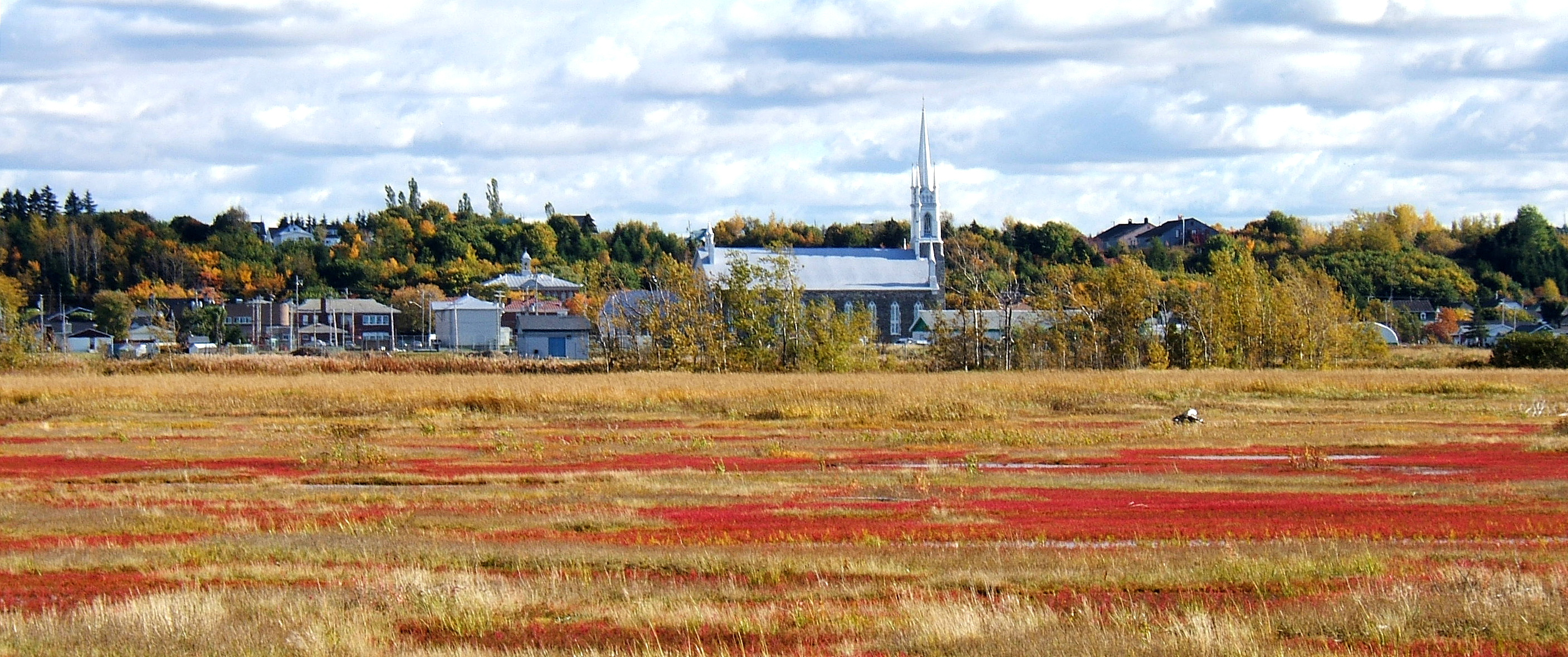 Vue du village de l'Isle-Verte au Bas-Saint-Laurent (Québec, Canada), à partir du quai sur le fleuve Saint-Laurent. Automne 2006. Auteur : Nicolas Gagnon